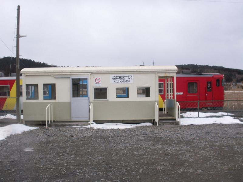 （2008年2月、投稿者Jnr bus撮影）